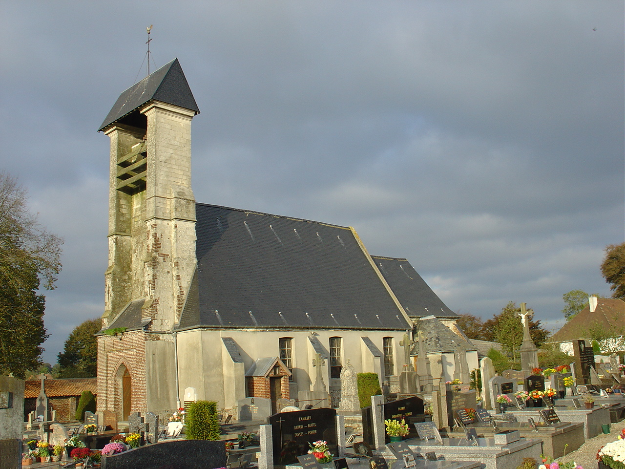 Église d'Ostreville